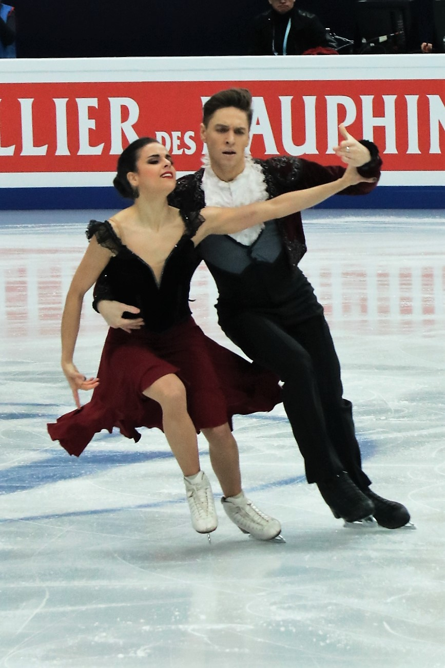 Сара Уртадо / Кирилл Халявин (Испания) на Чемпионате Европы по фигурному катанию 2018.